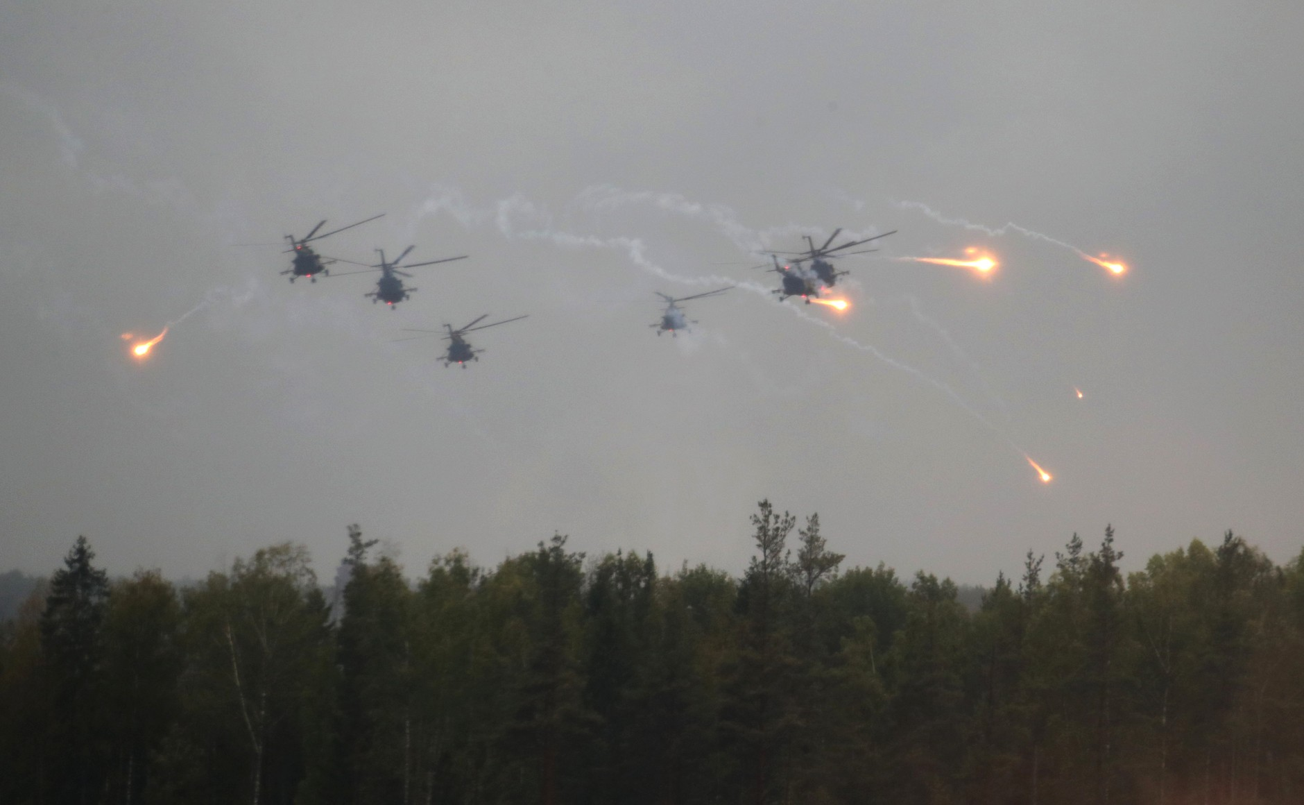 Совместные российско-белорусские стратегические учения «Запад-2017».